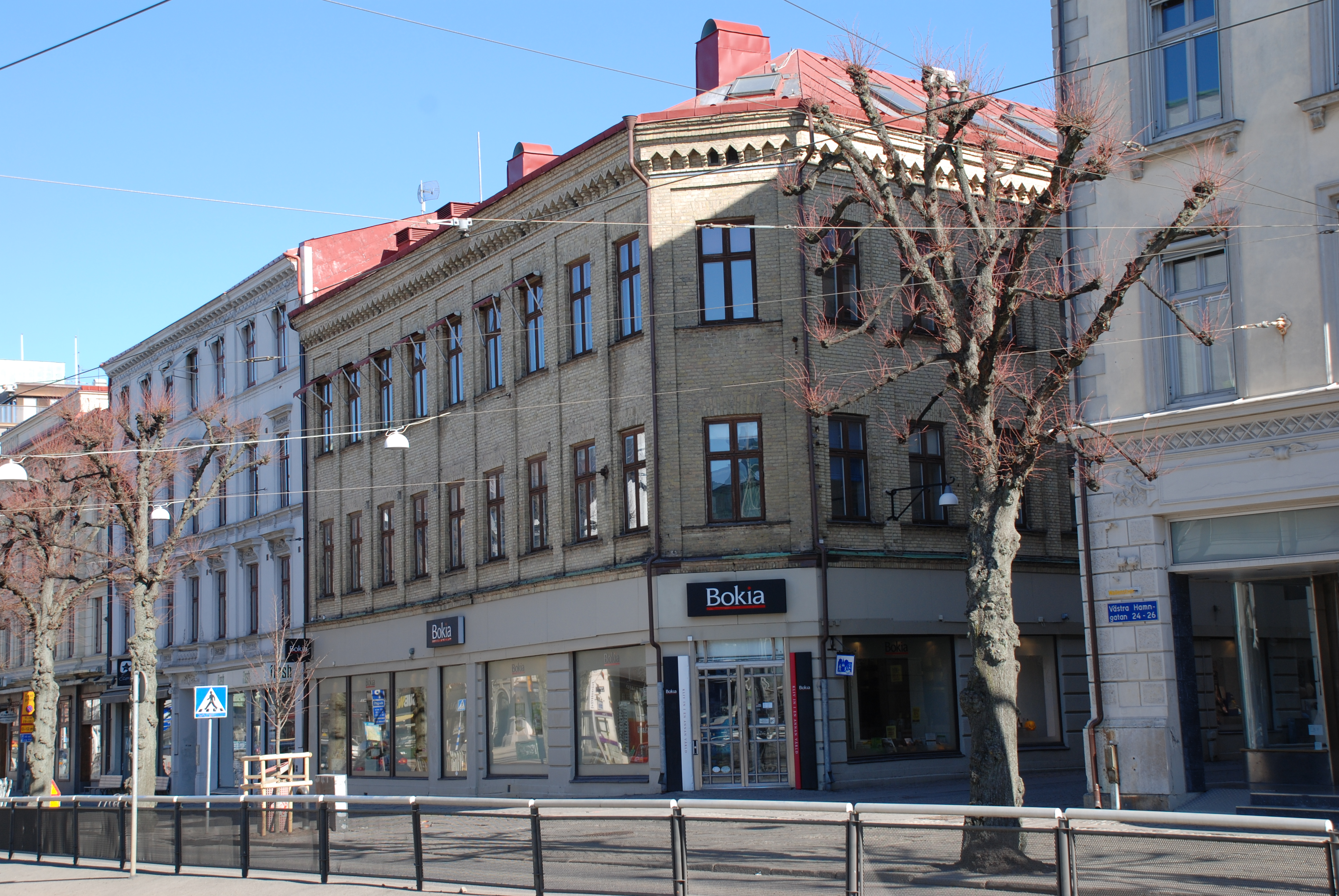 Västra Hamngatan 22/Södra Larmgatan 8 i Göteborg. Wettergrens bokhandel (numera Bokia).